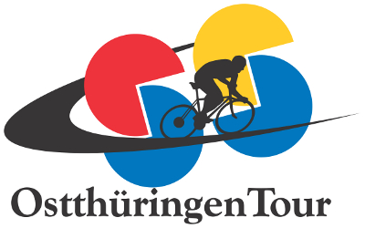 Ott-logo ot